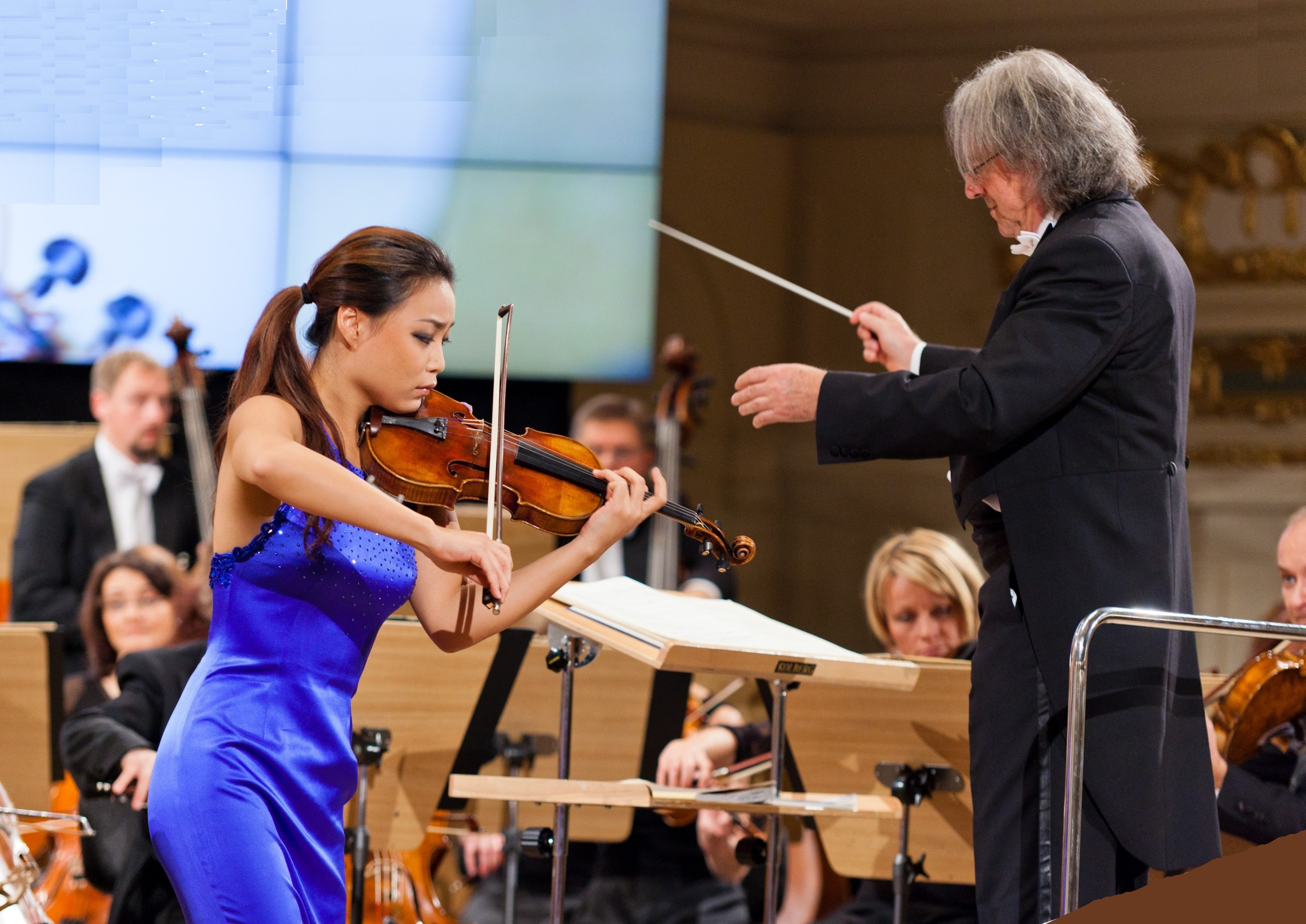 Die koreanische Geigerin Soyoung Yoon beim 14. Wieniawski-Wettbewerb in Posen, das Orginalbid [: wurde gedreht und beschnitten